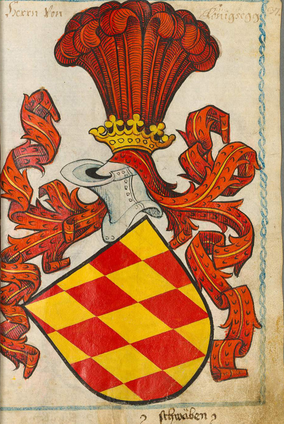 Scheibler'sches Wappenbuch, älterer Teil Königsegg